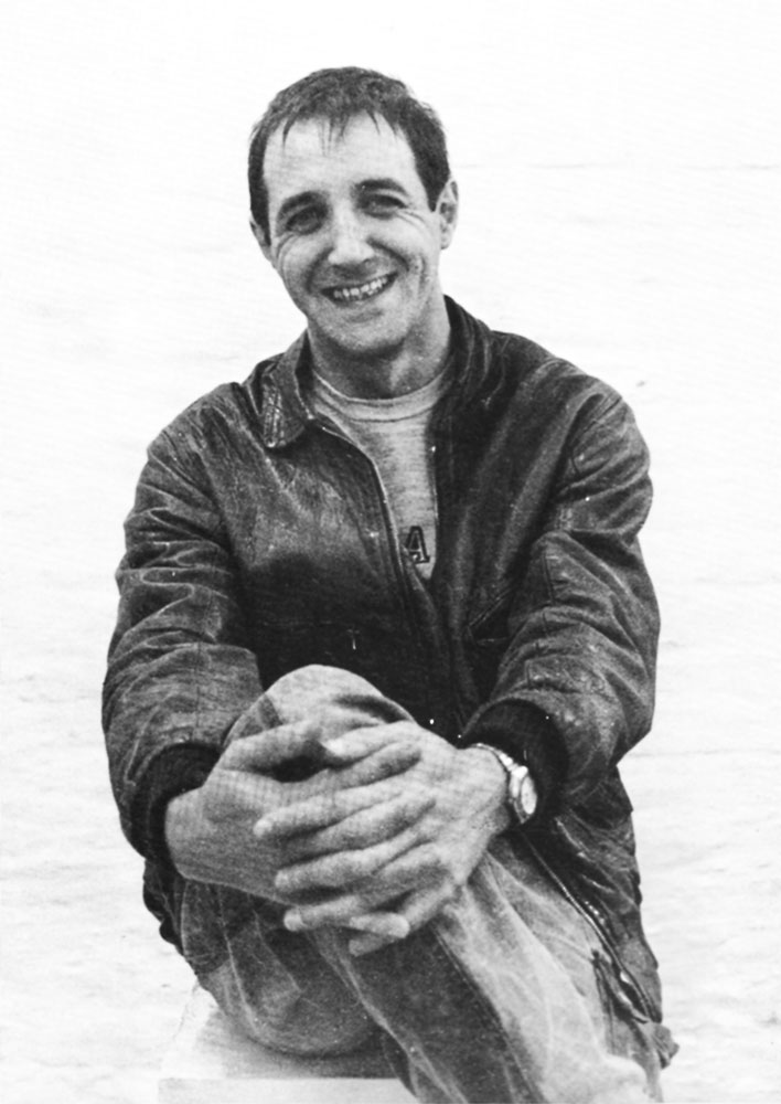 Foto zum Katalog zur Ausstellung in Graz, 1986